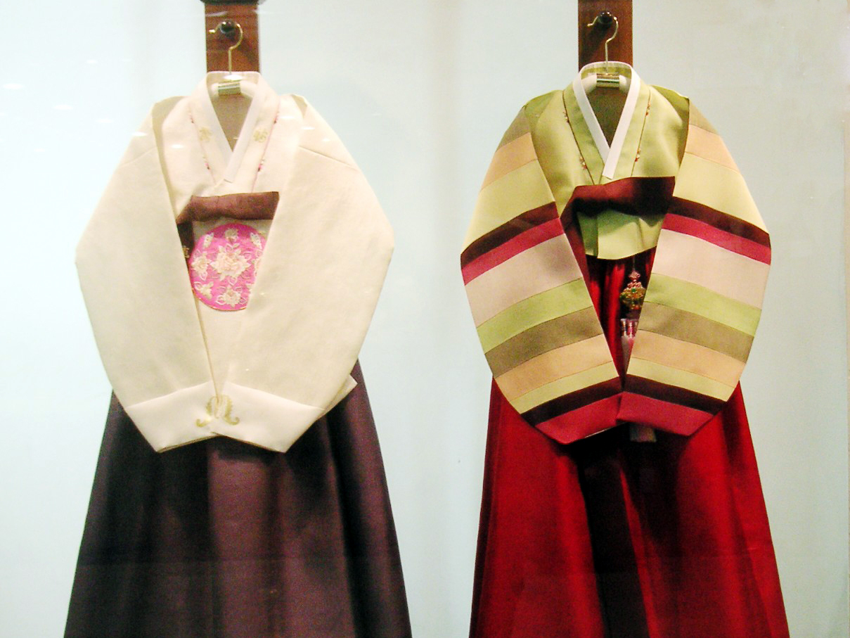 Hanbok